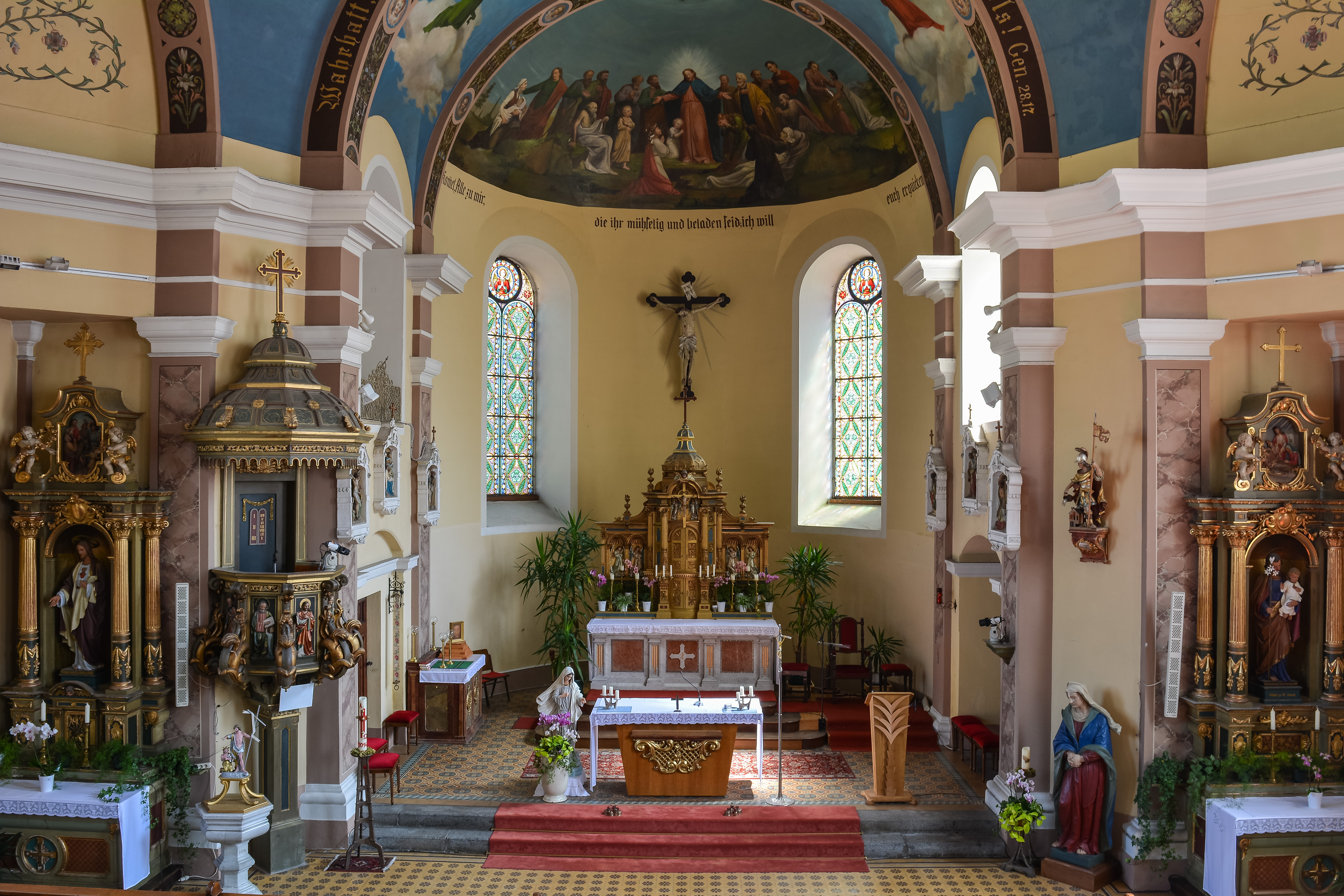 Chor der kath. Pfarrkirche hl. Florian in Neumarkt im Hausruckkreis